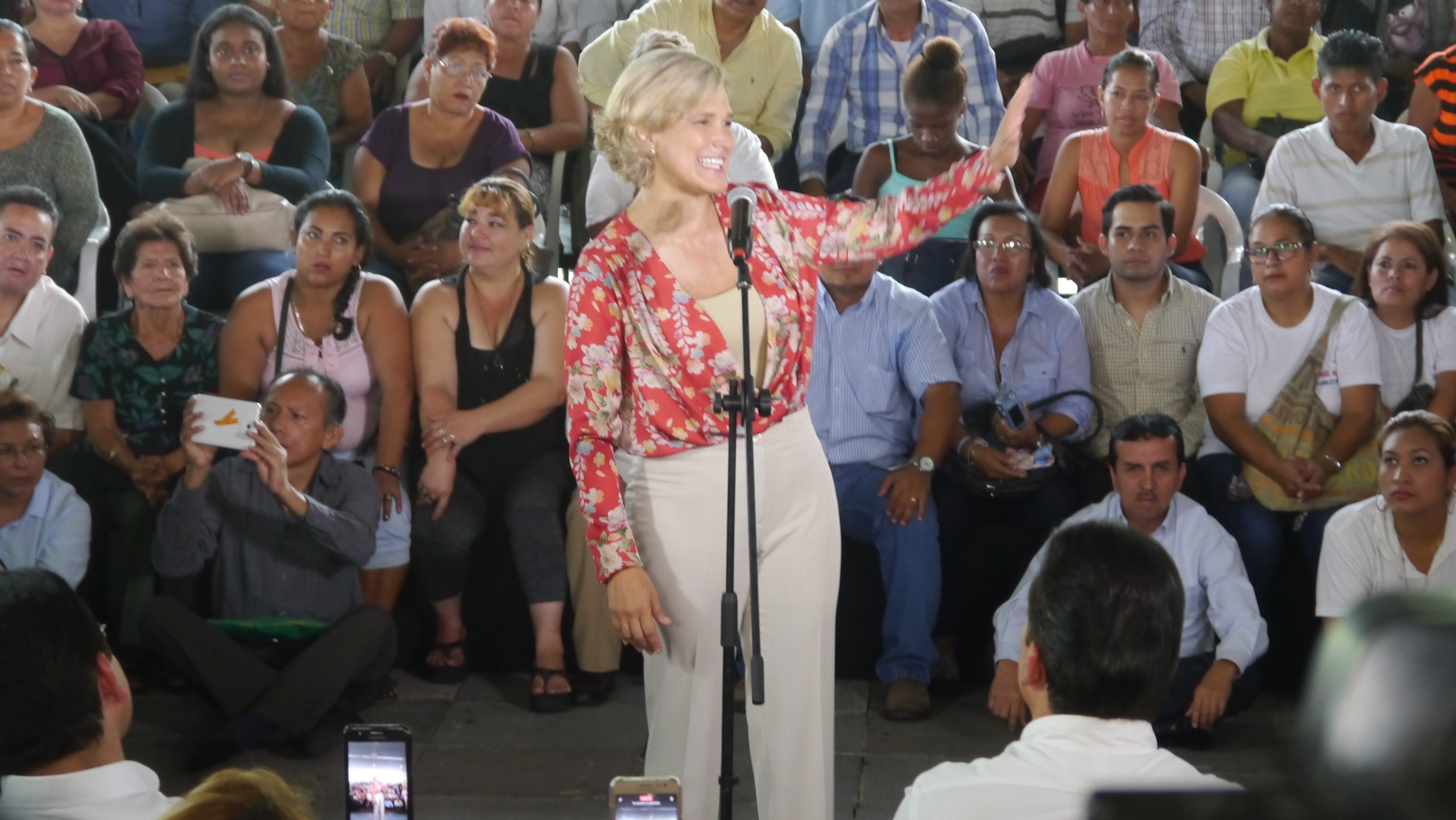 Cynthia Viteri durante campaña presidencial del 2017